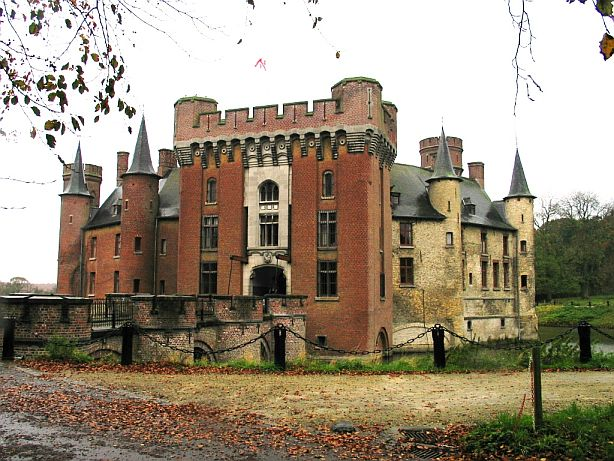 kasteel van wijnendale - eigen foto